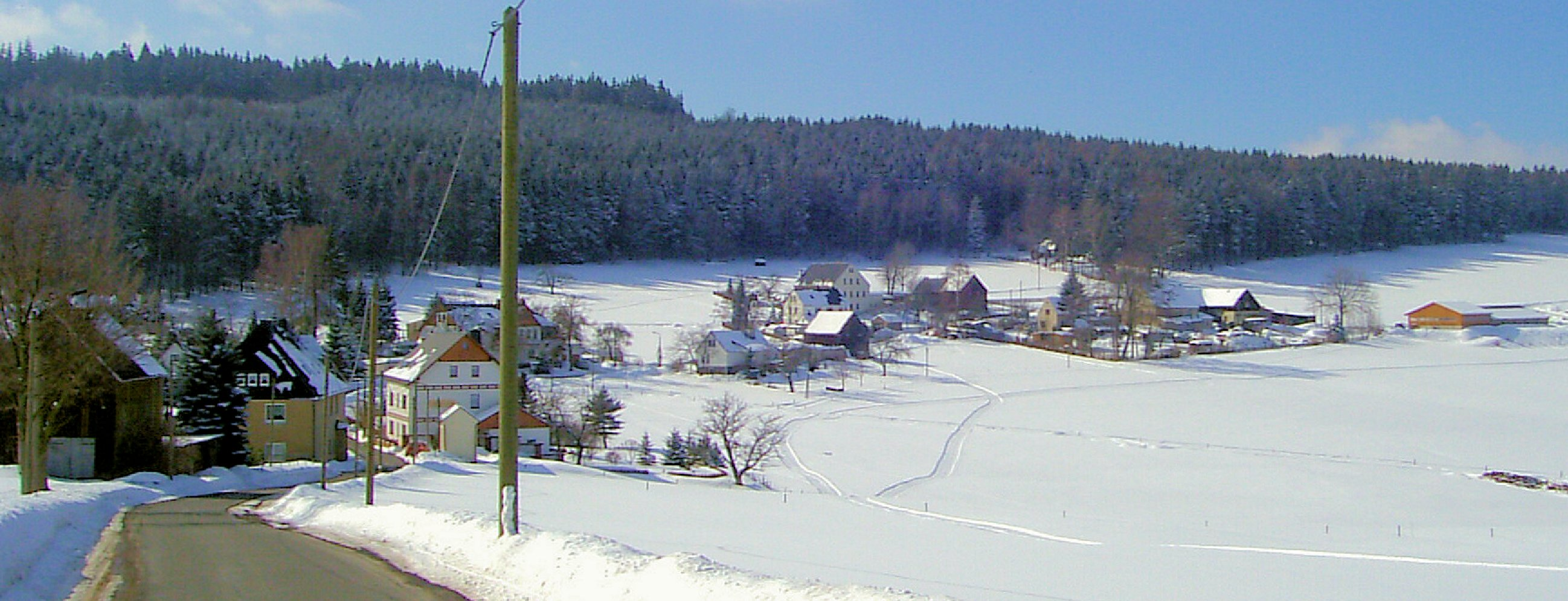 Lengefeld, Ortsteil Vorwerk, Erzgebirge, Deutschland